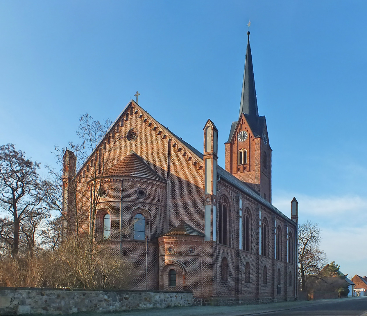 Denkmalgeschützte Kirche in Elster